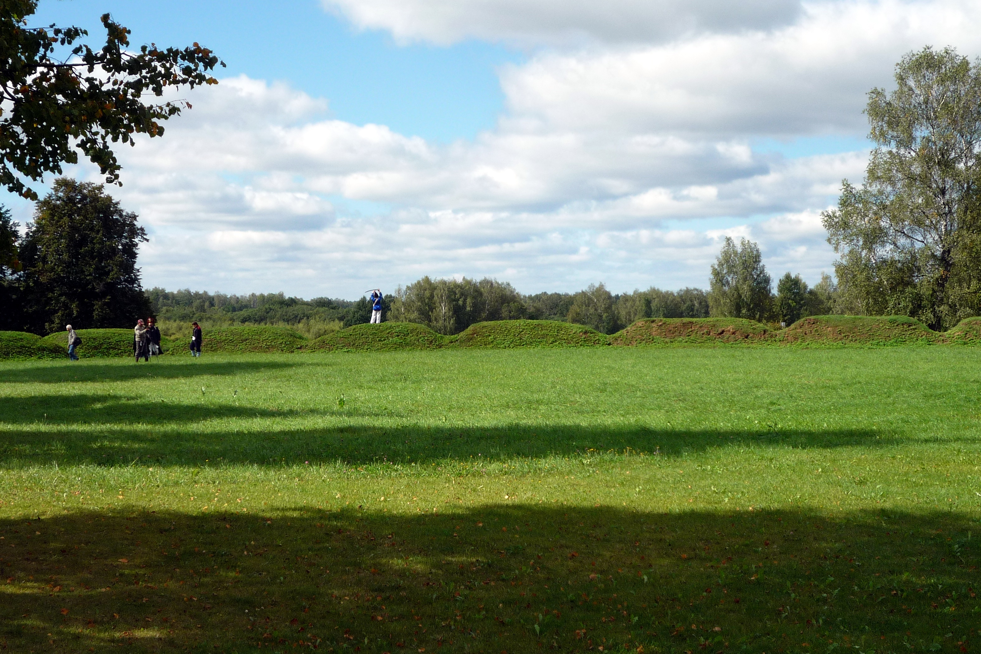 Флеши Багратиона (северная, средняя, южная): ЮЗ деревни, Семёновское, Можайский район, Московская область